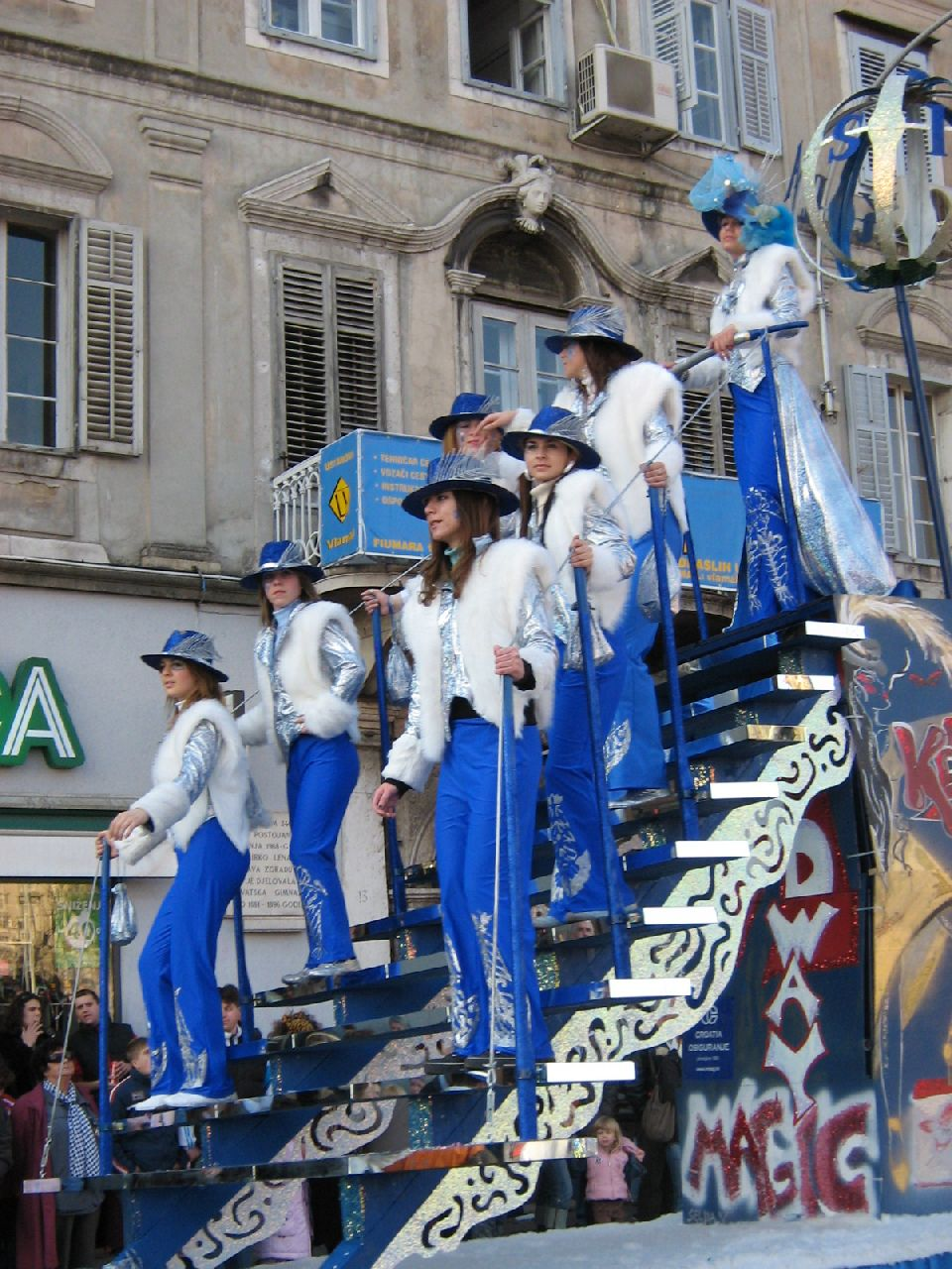 Rijeka Carnival – Mask beauty- Krasica